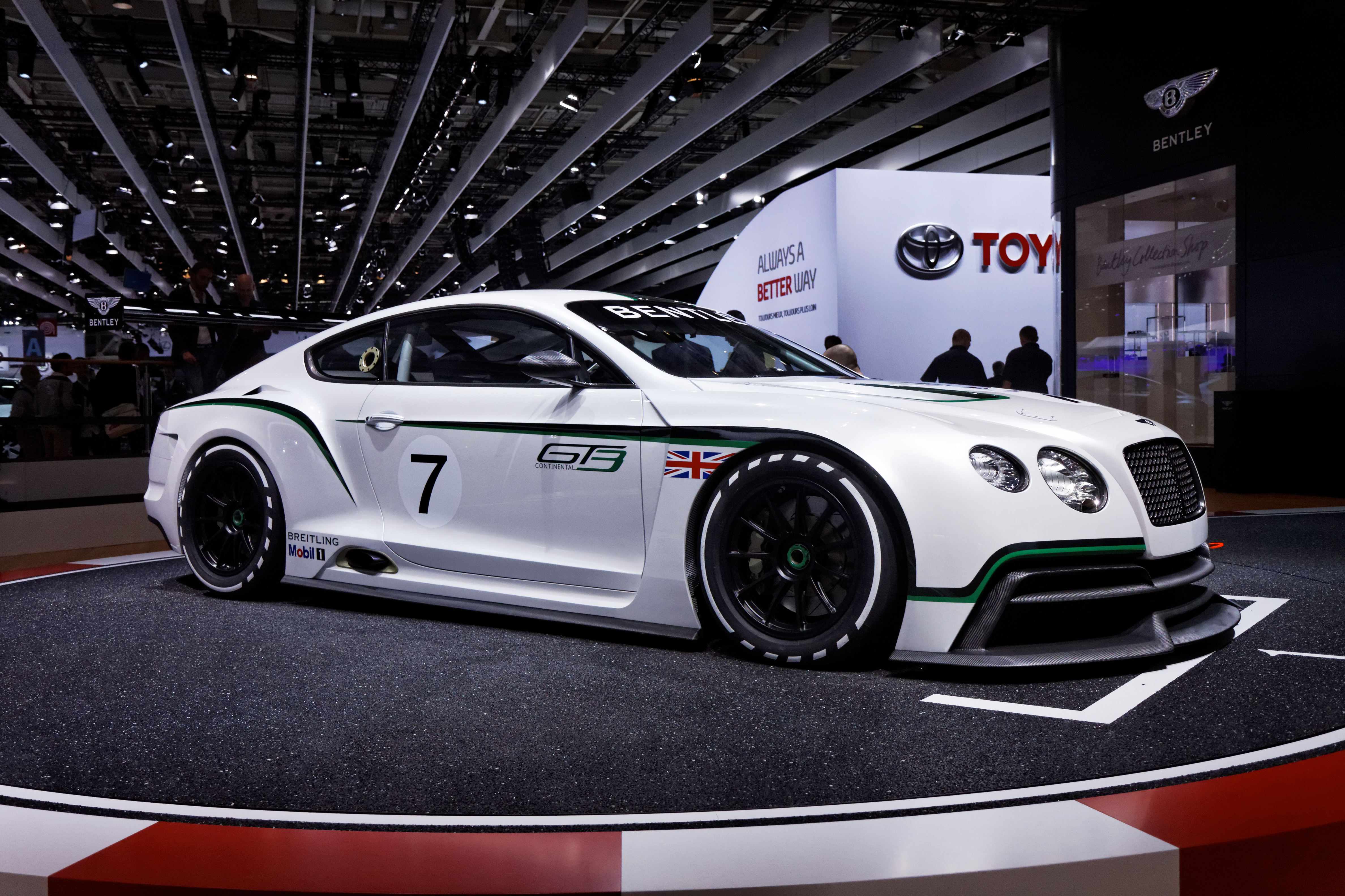 Une Bentley Continental GT3 présentée lors du Mondial de l'Automobile de Paris 2012.